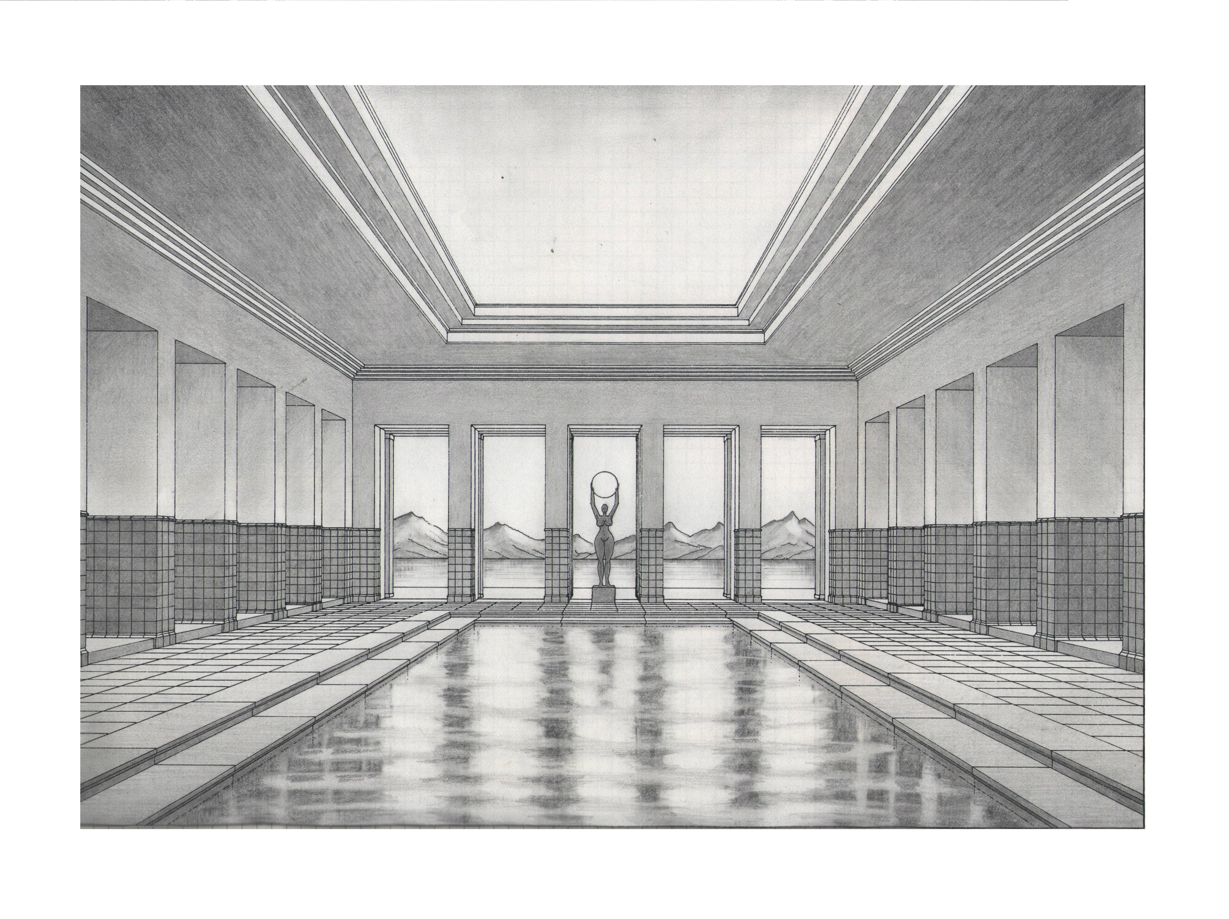 Arnaldo Dell'Ira (1903-1943), Piscina sul Lago di Garda